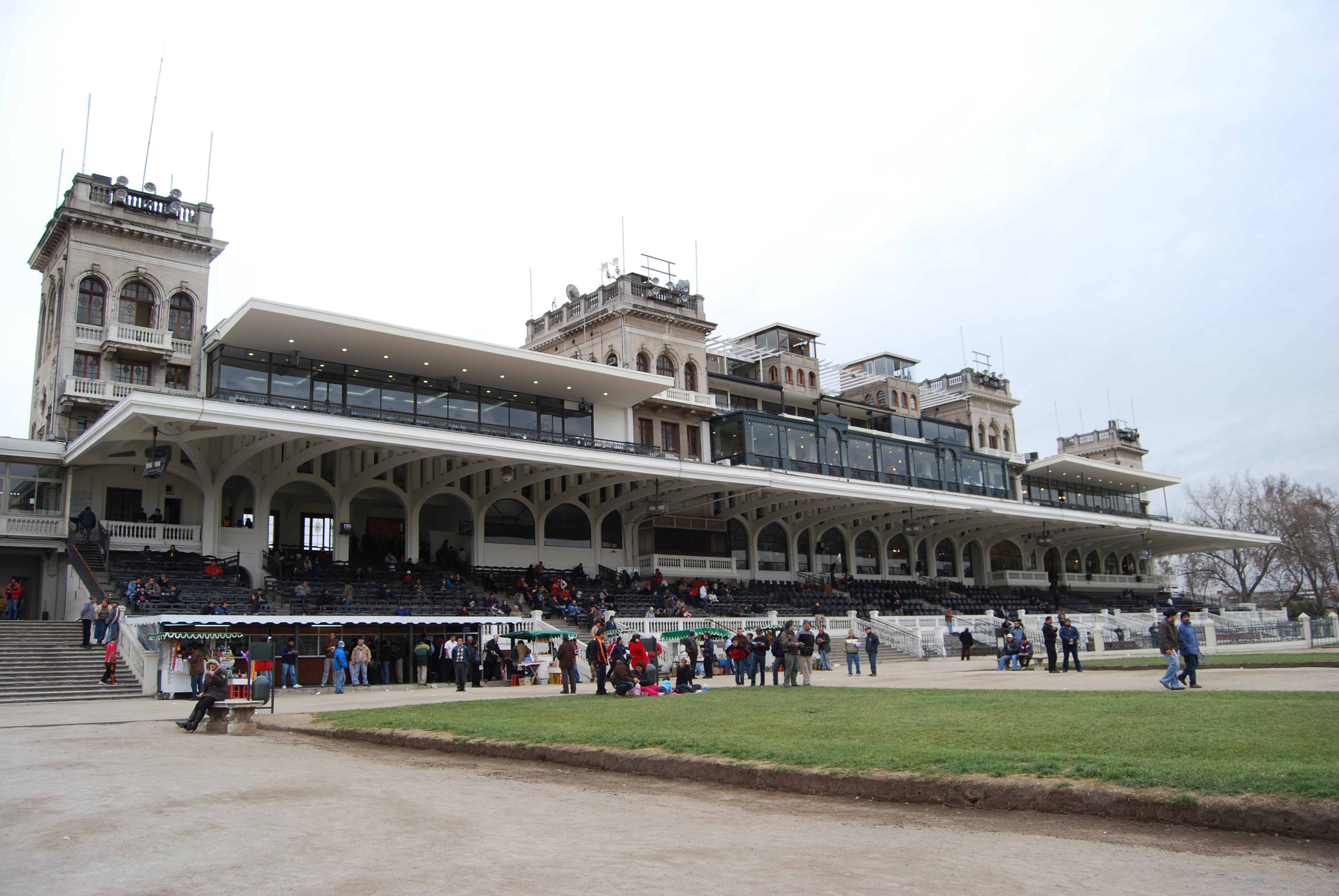 Edificio de galerias y tribuna del Club Hípico de Santiago, Chile. Edificado entre 1918 y 1923, diseñado por el arquitecto Josué Smith Solar. Monumento Histórico.